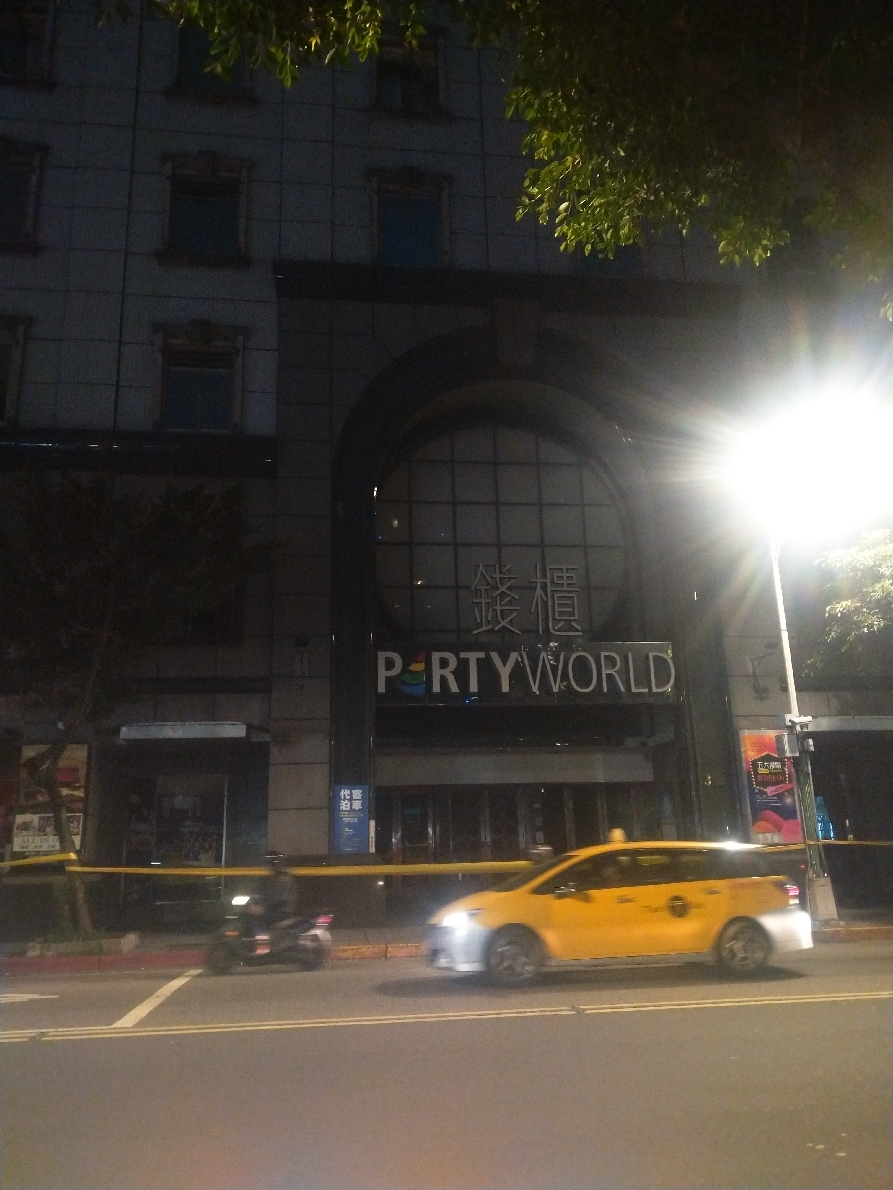 中文（台灣）: 錢櫃林森店於2020年4月26日發生火災，目前暫時停業。